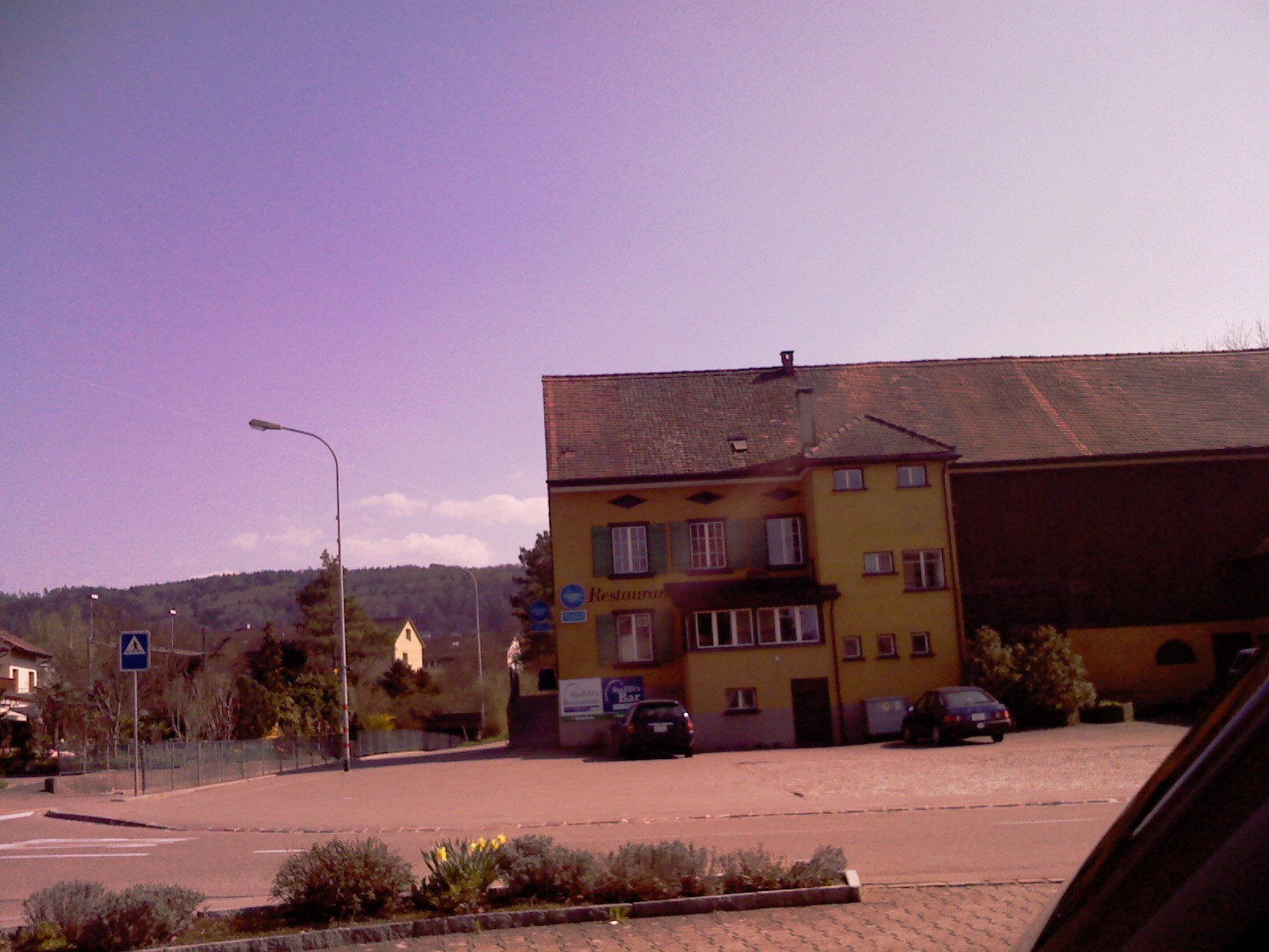 Gastejo en Felben-Wellhausen, Kantono Turgovio, Svislando